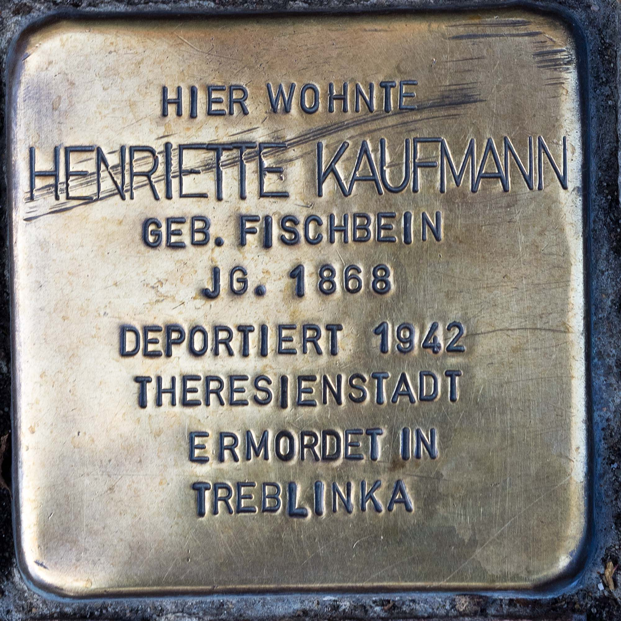 2016 Stolpersteine Toevo Henriette Kaufmann